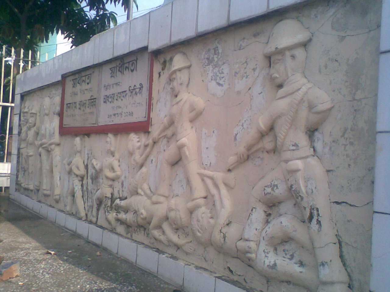 “স্বাধীনতা” ভাষ্কর্যের বেদীর ছবি, যাতে পর্যাক্রমে চিত্রিত হয়েছে ১৯৭১ সালে পাক আগ্রাসন, মুক্তিযোদ্ধাদের প্রতিরোধ আর সবশেষে কাঙ্খিত বিজয়